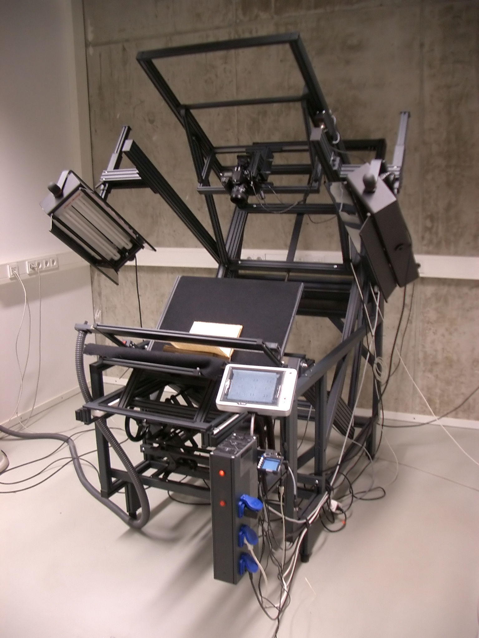 Grazer Buchtisch. Standort: Digitalisierungszentrum der SLUB Dresden